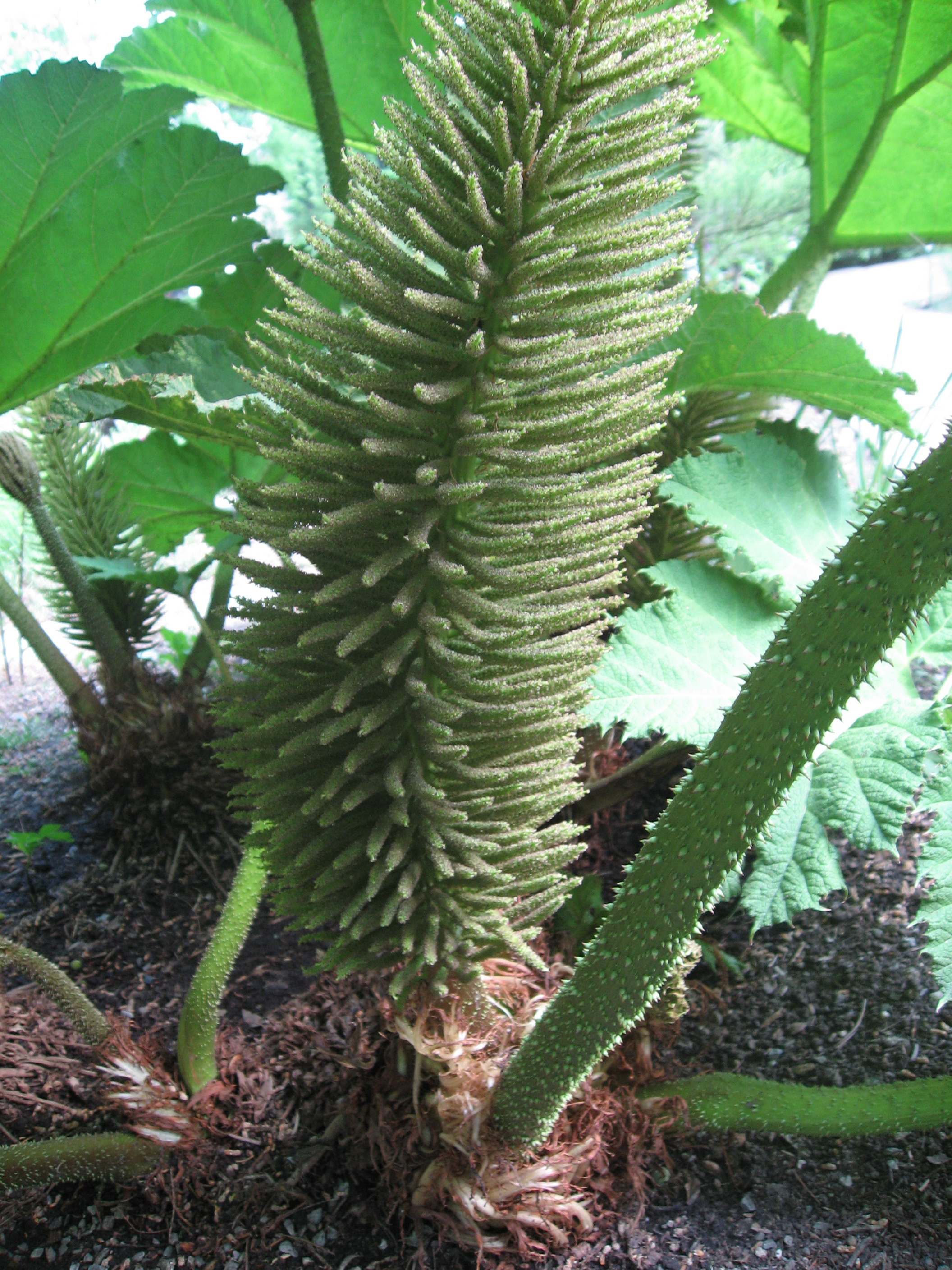 Gunnera manicata